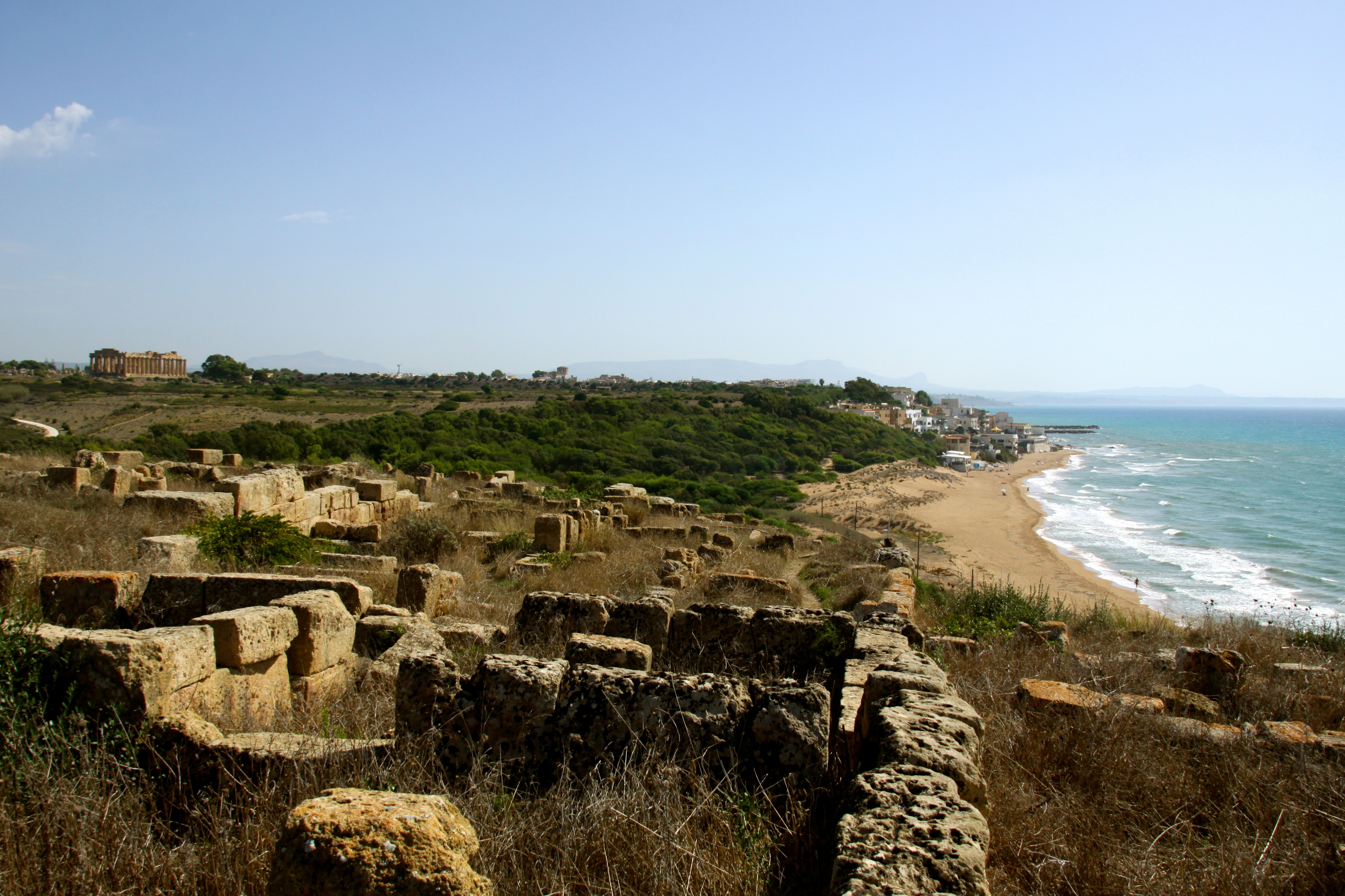 Temple E (Selinunte)